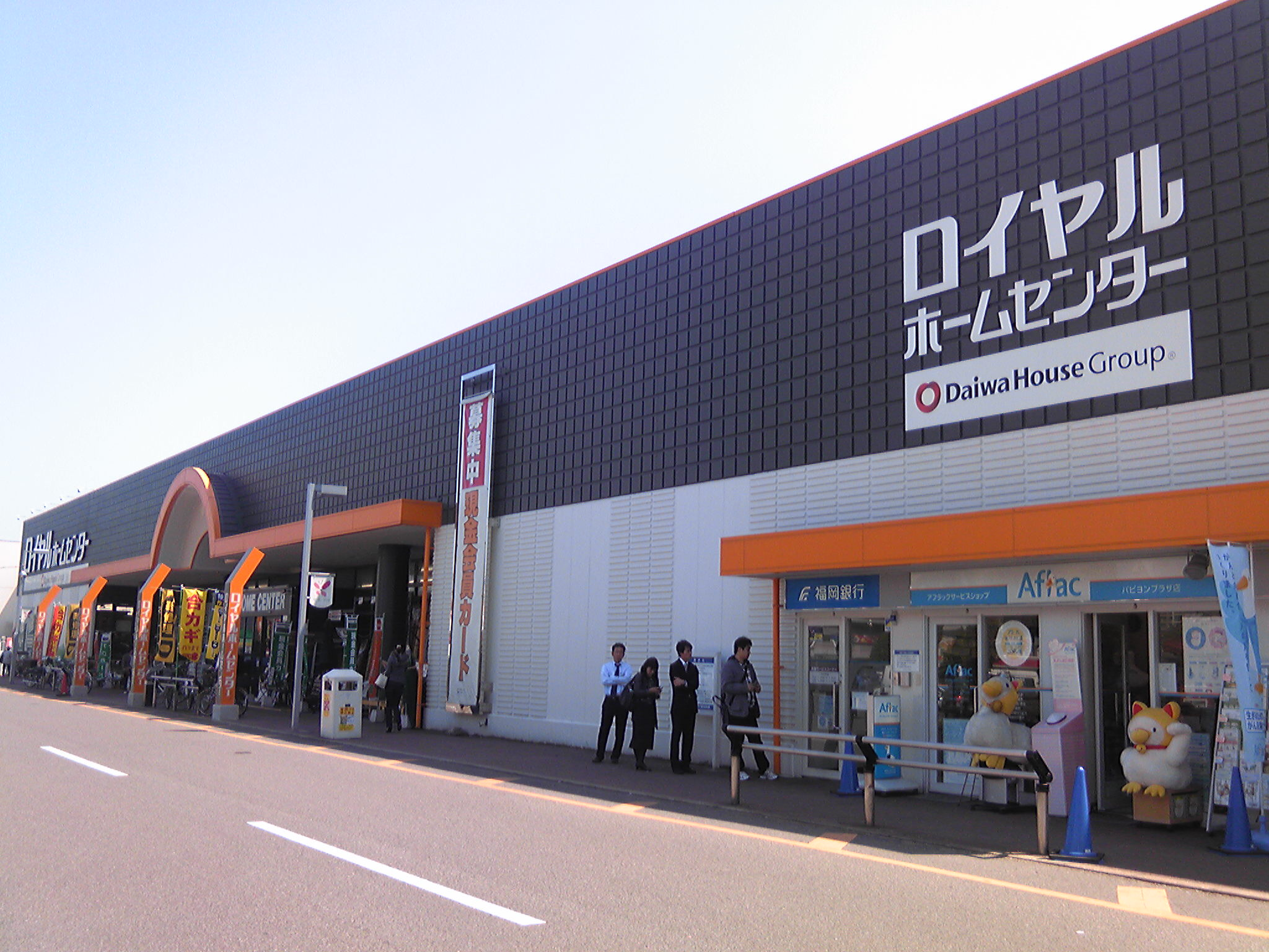 ロイヤルホームセンター吉塚店（福岡市博多区）